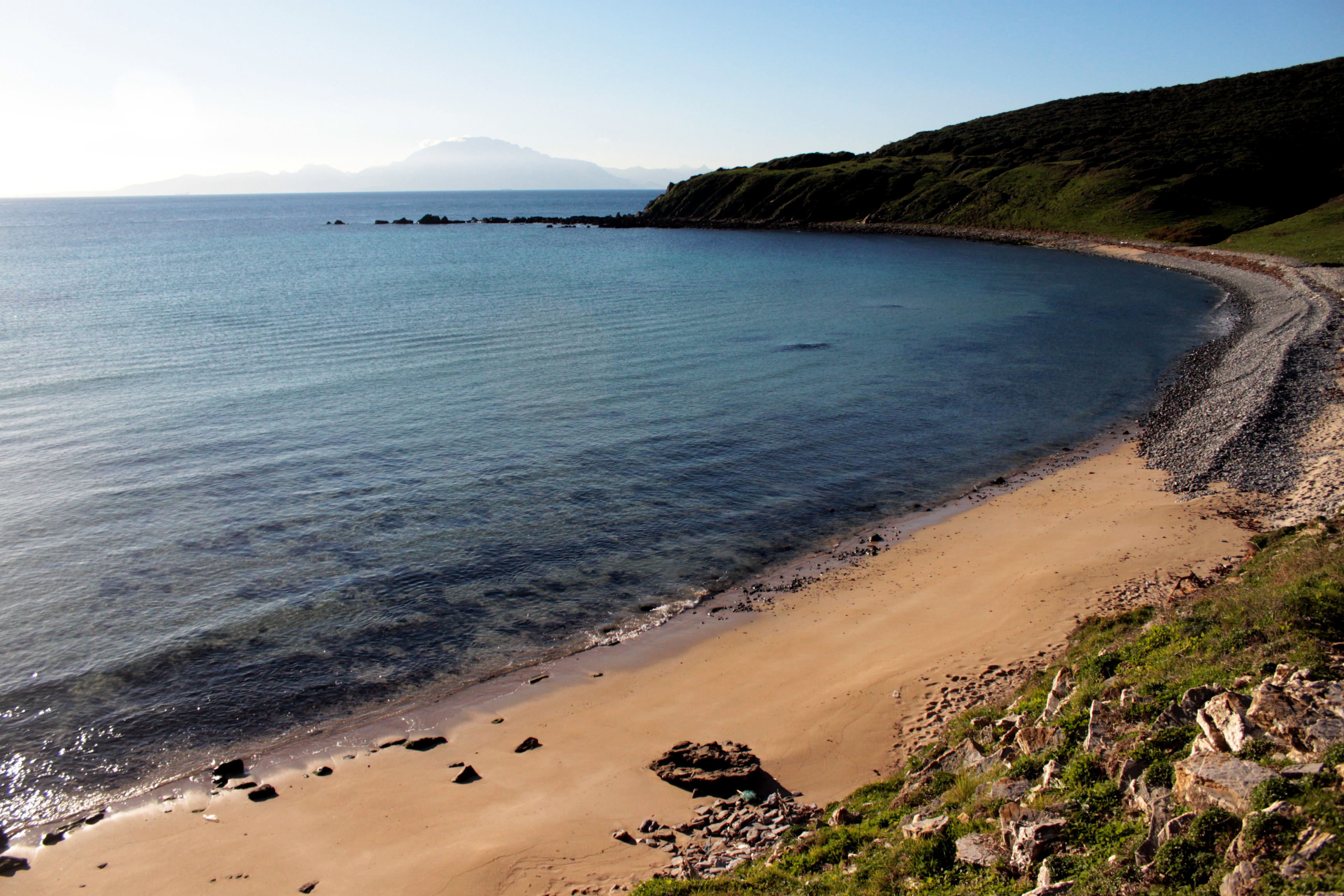 Vista de Cala Arenas desde la Punta de la Tia Abelica. Se observa la Punta del Fraile, que cierra la cala por el sur y al fondo el monte Musa, en la costa de África. Algeciras, Andalucía, España.